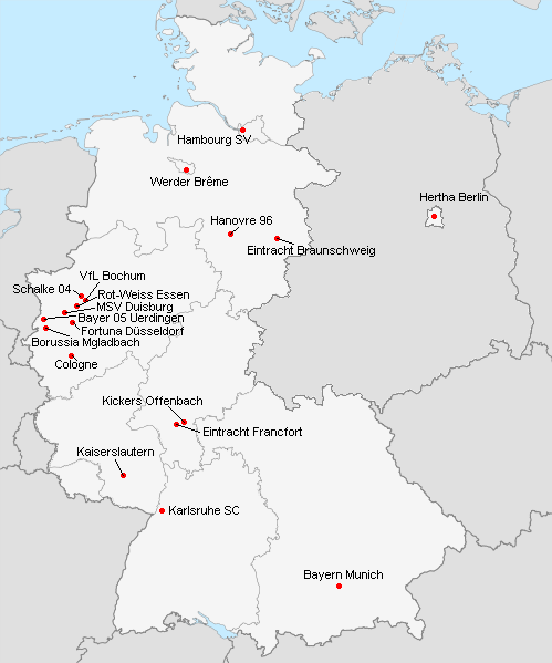 Répartition des clubs en 1.Bundsliga 1975-1976.